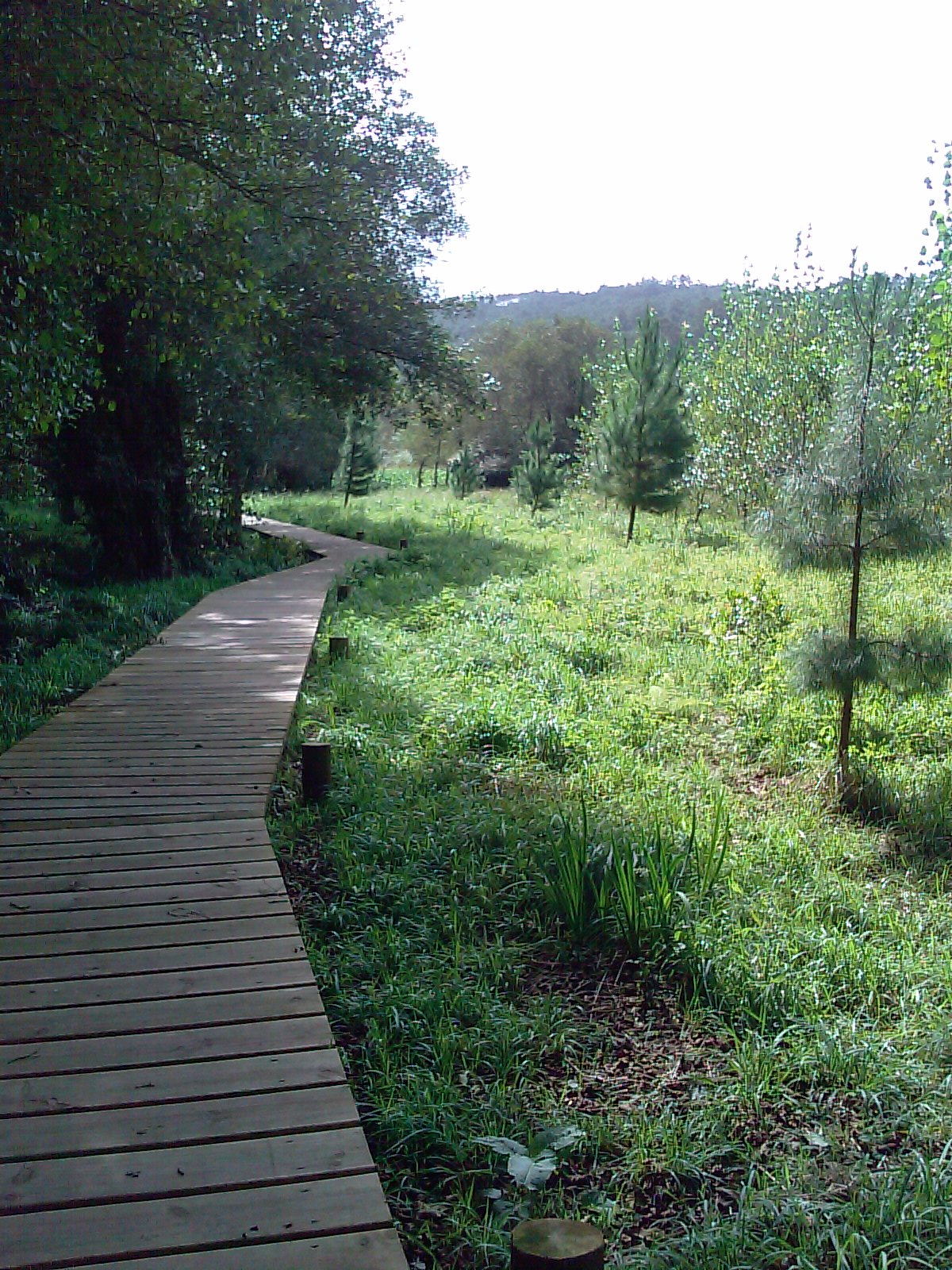 Senda do Rego dos Muiños